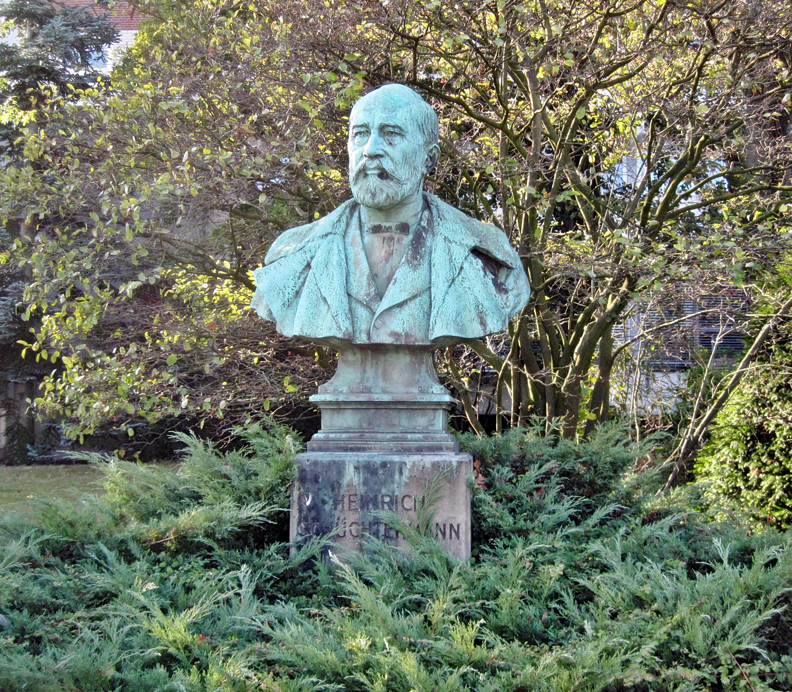 Bad Rothenfelde, Schüchtermanndenkmal